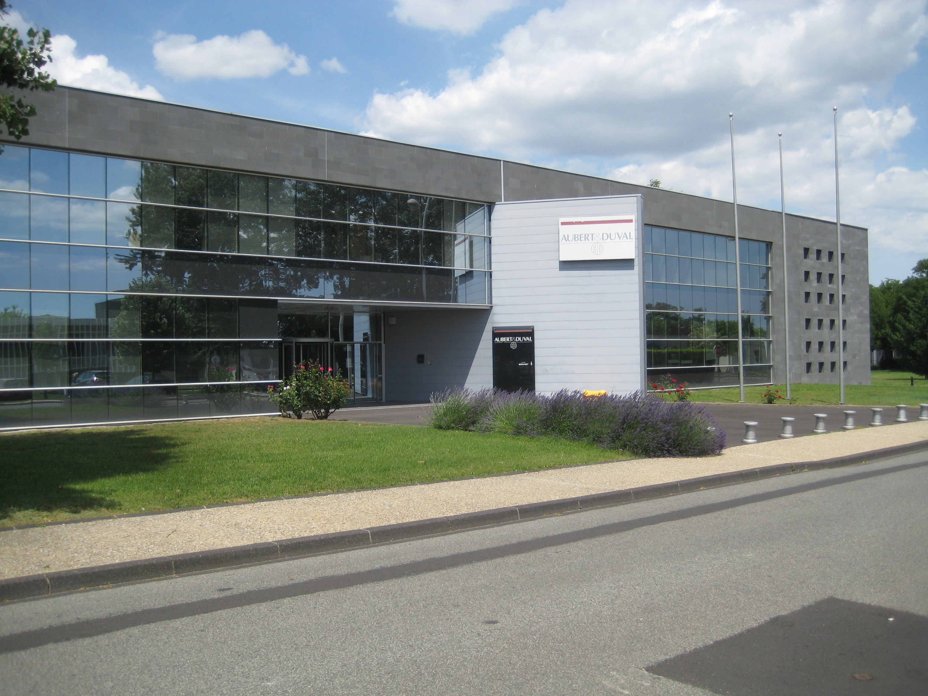 siège d'Aubert & Duval à clermont-Ferrand